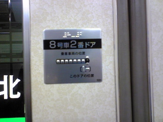 札幌市営地下鉄 ドアに貼られた点字シール